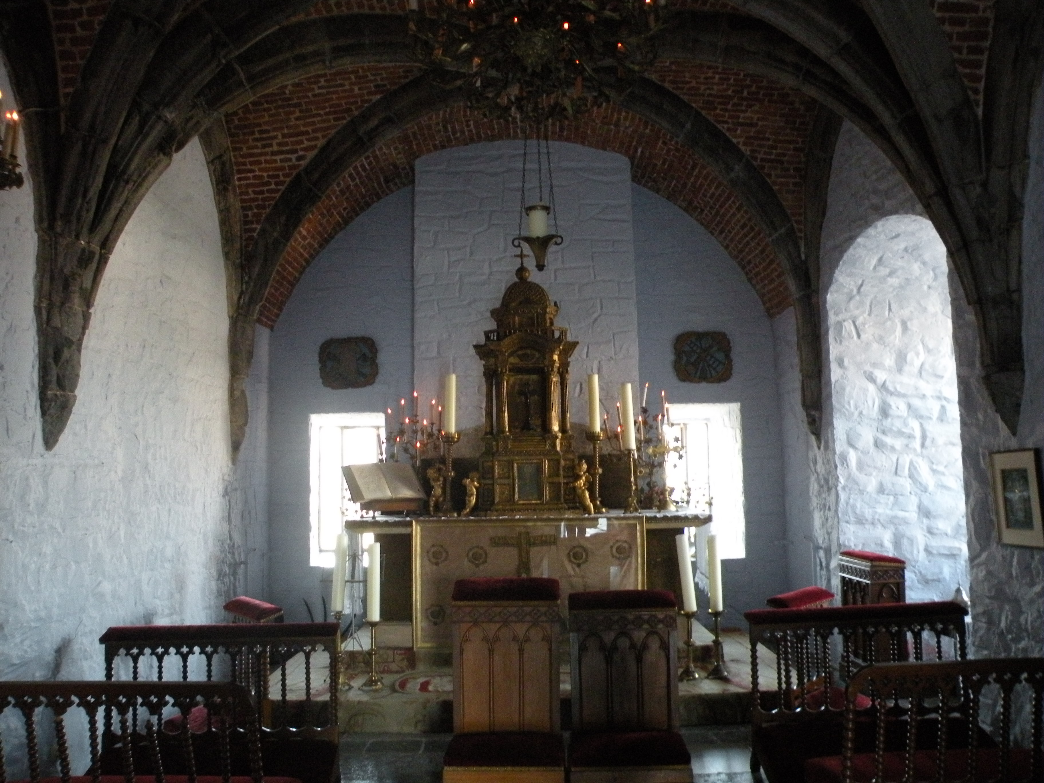 chateau de Chimay - Chapelle